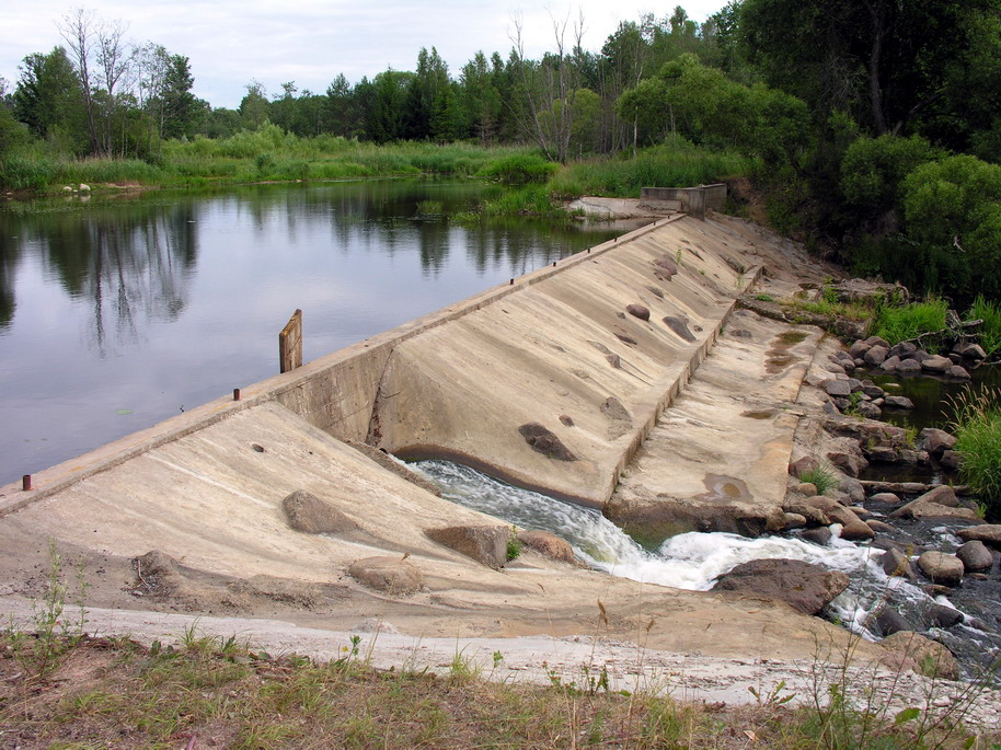 Skleipiai, Mažeikių raj., Viekšnių seniūnija, Virvytės užtvanka Foto: Algirdas, 2006 m. liepos 18 d., Lietuva